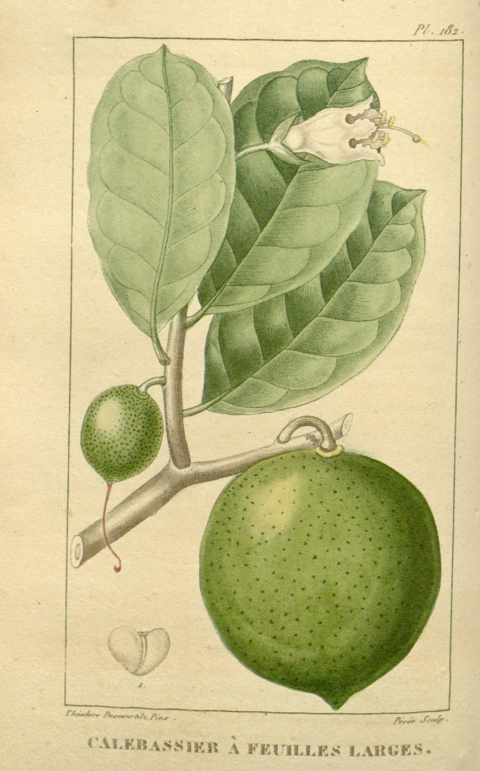 /'/. y/f^ r/,^i,^ /),^„.,.,,/^^ /j yj.^ .r.;./r « Al.KlïA.SSlKH \ FKiiïJ.KS I.AHiîKS.